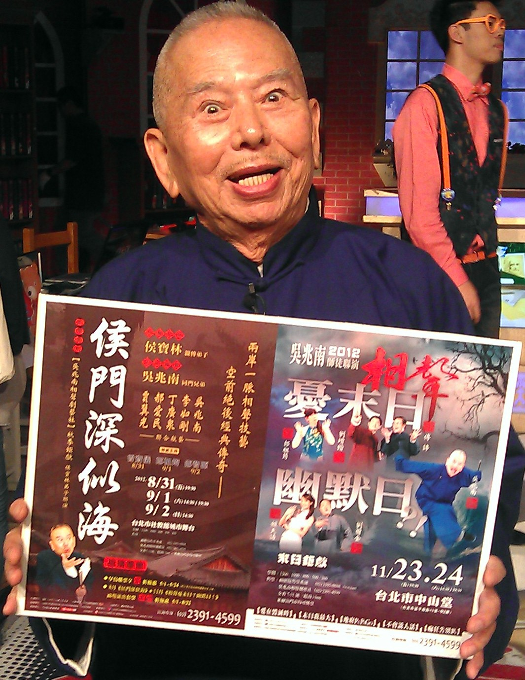 相聲大師吳兆南在《百萬小學堂》錄影現場手持宣傳吳兆南相聲劇藝社《侯門深似海》與《憂末日、幽默日》的海報。